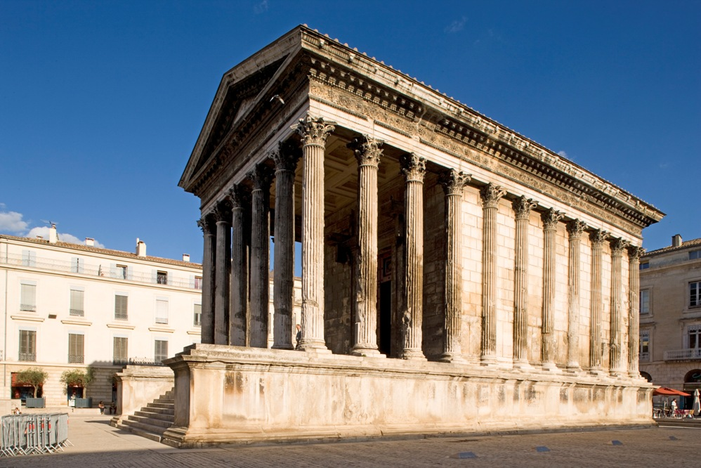 Arènes de Nîmes